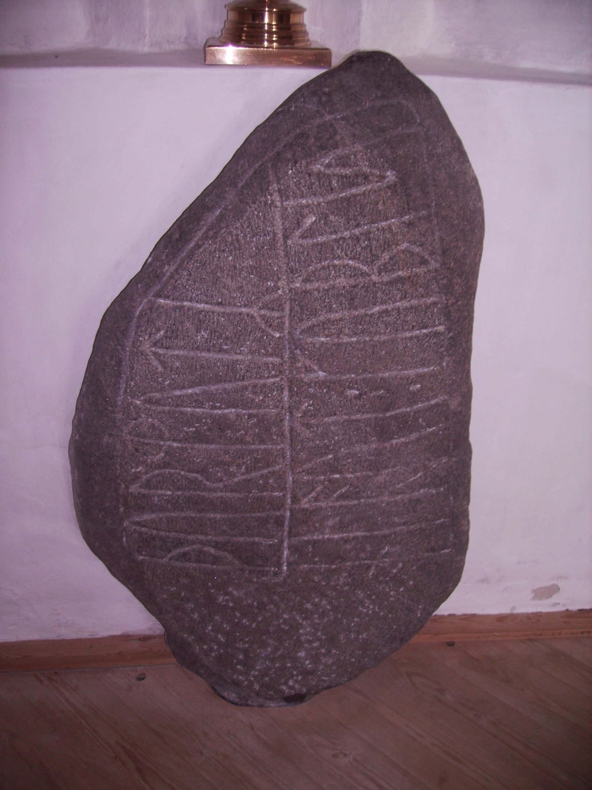 Nørre Nærå Kirke, Nørre Nærå Sogn, Skam Herred, Odense Amt, Denmark (Danish Church) - Runesten i Nørre Nærå Kirke